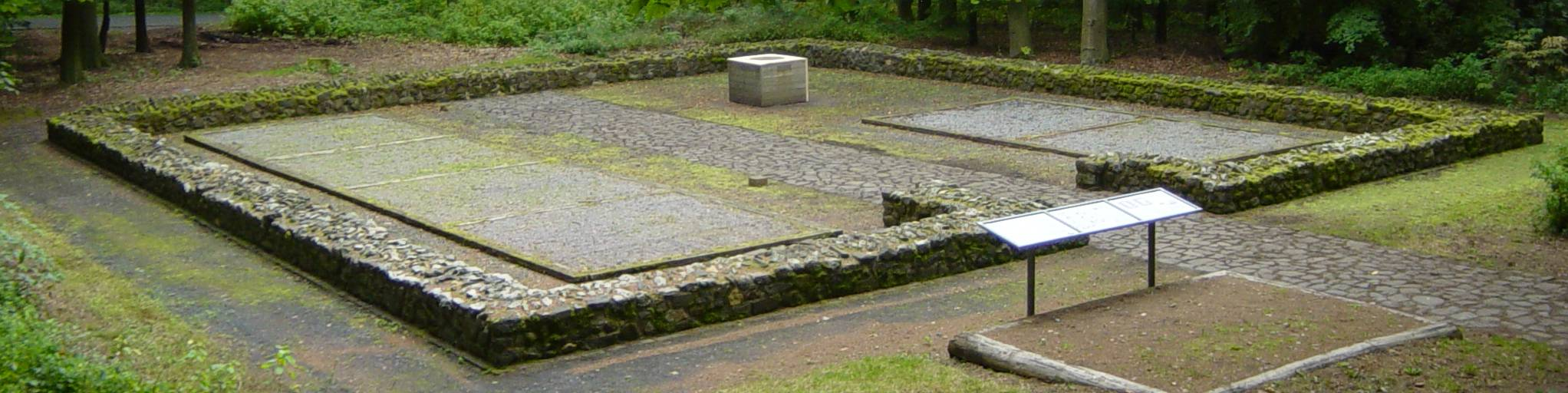 Römisches Kleinkastell am Obergermanisch-Raetischen Limes, Komplett, vom Limes, Weitwinkel